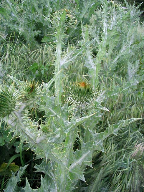 Onopordum acanthium (chardon-aux-ânes) Photo prise à Marcevol (Arboussols) en mai 2004 Jean Tosti 2005